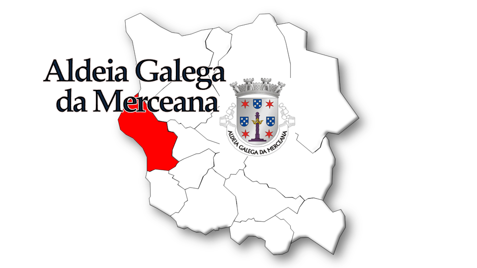 Evolução da População